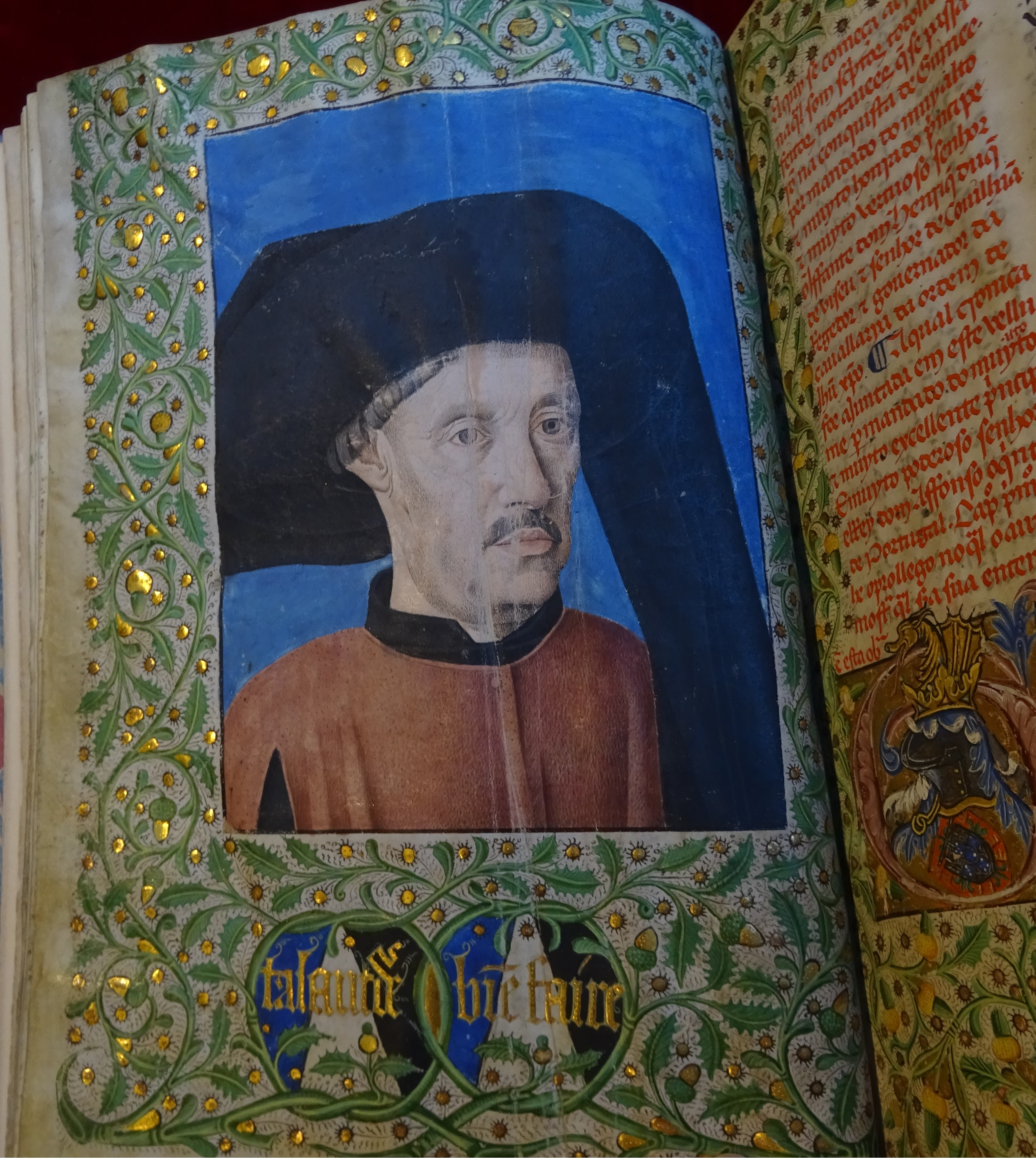 Uma investigação recente no Códice de Paris da Crónica da Guiné mostrou que este é o verdadeiro retrato do Infante D. Pedro e não do seu irmão Infante D. Henrique